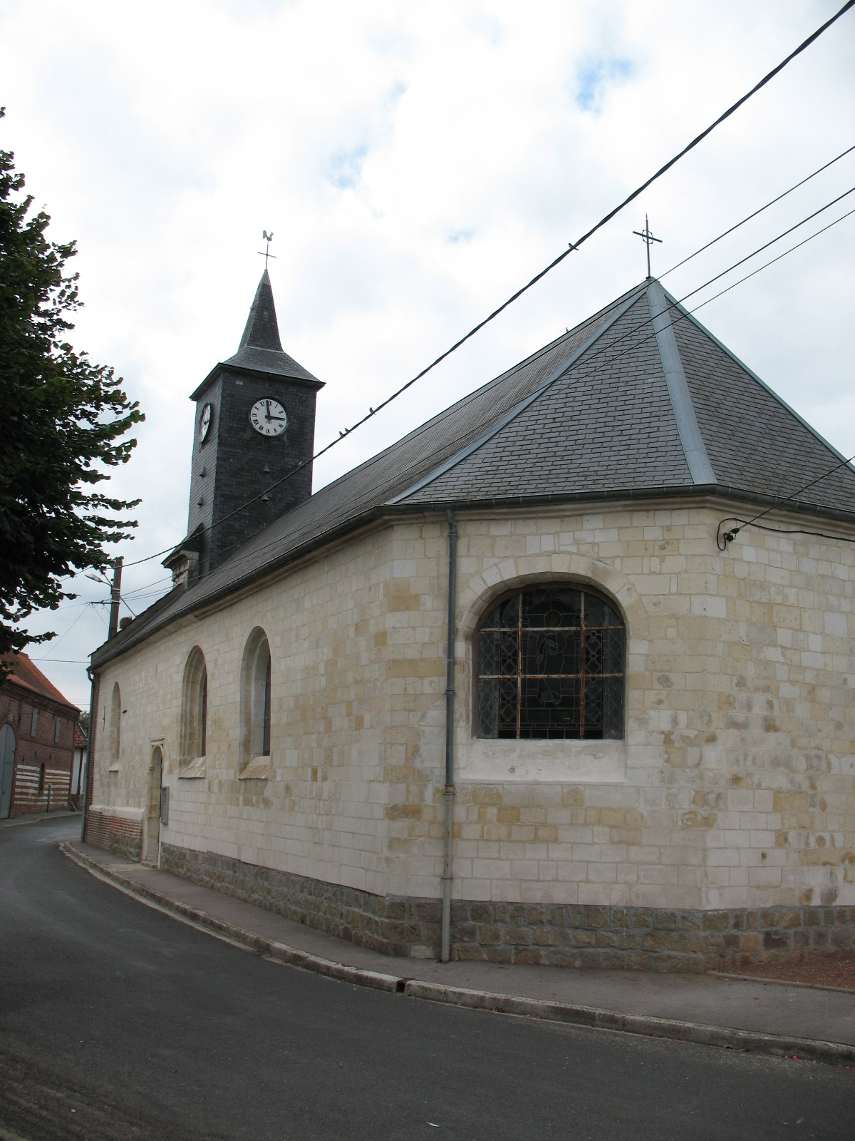 Eglise de Franvillers.